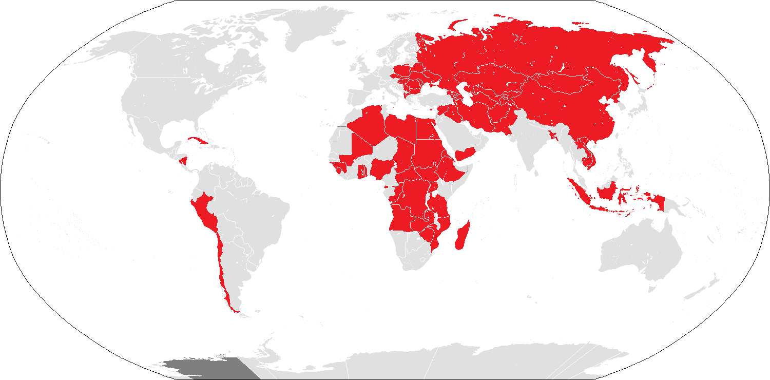 русский (ru): Пользователи ДШК Пользователи ДШК.